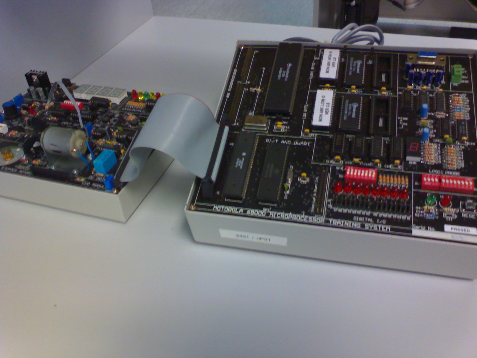 Trainer Motorola 68k, digunakan untuk melakukan simulasi peranti elektronik